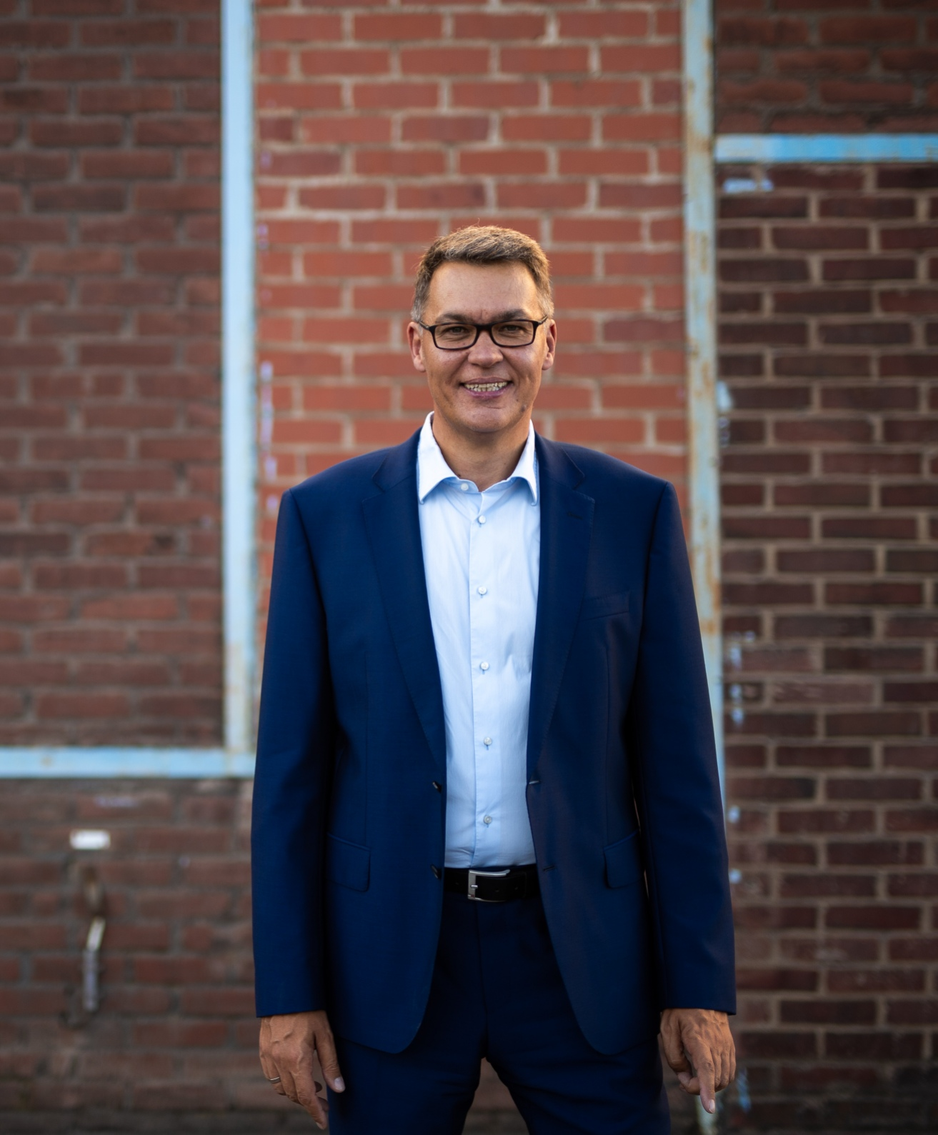 Portrait Thomas Westphal, Dortmunder Hafen 2018